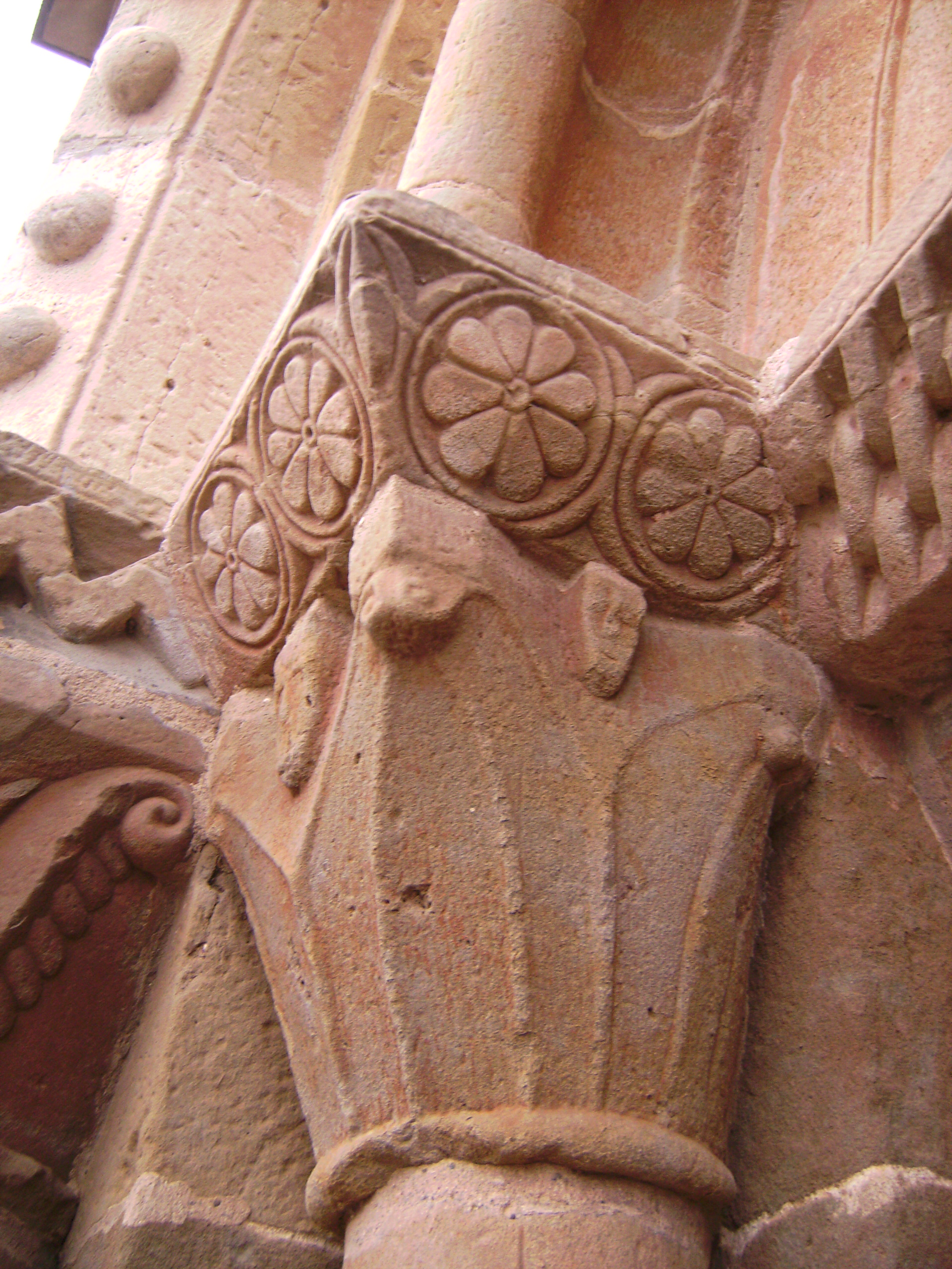 Pelagalls - Iglesia de Sant Esteve (Capitel 1)